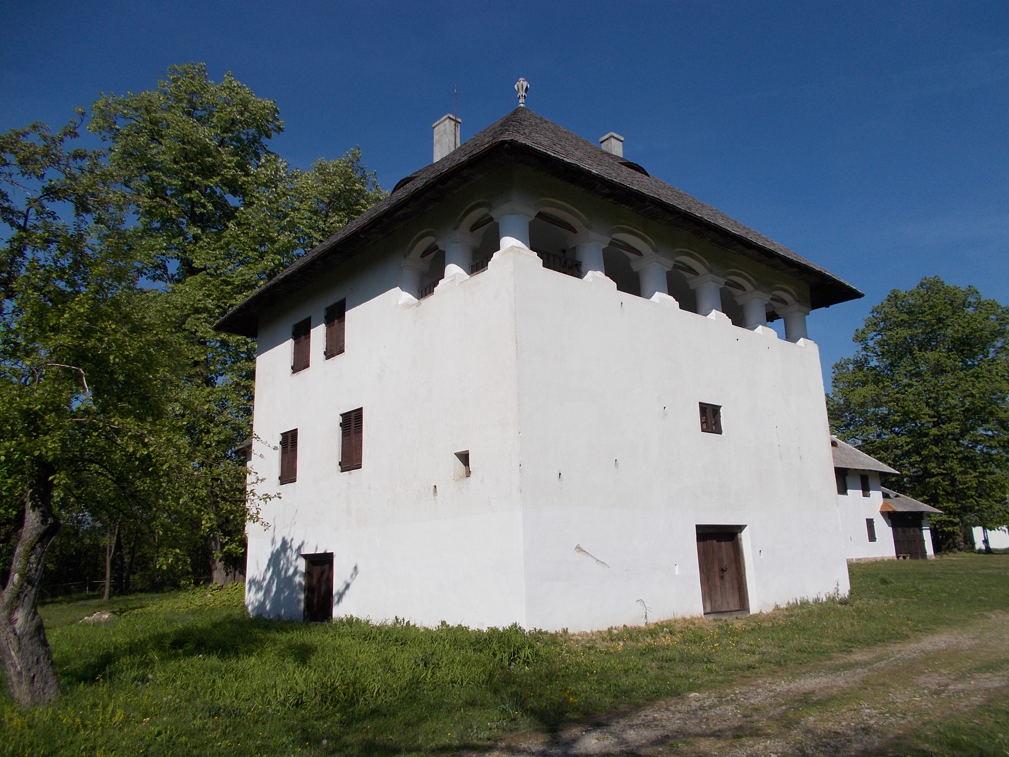 Cula Cornoiu, Curtișoara, județul Gorj 01